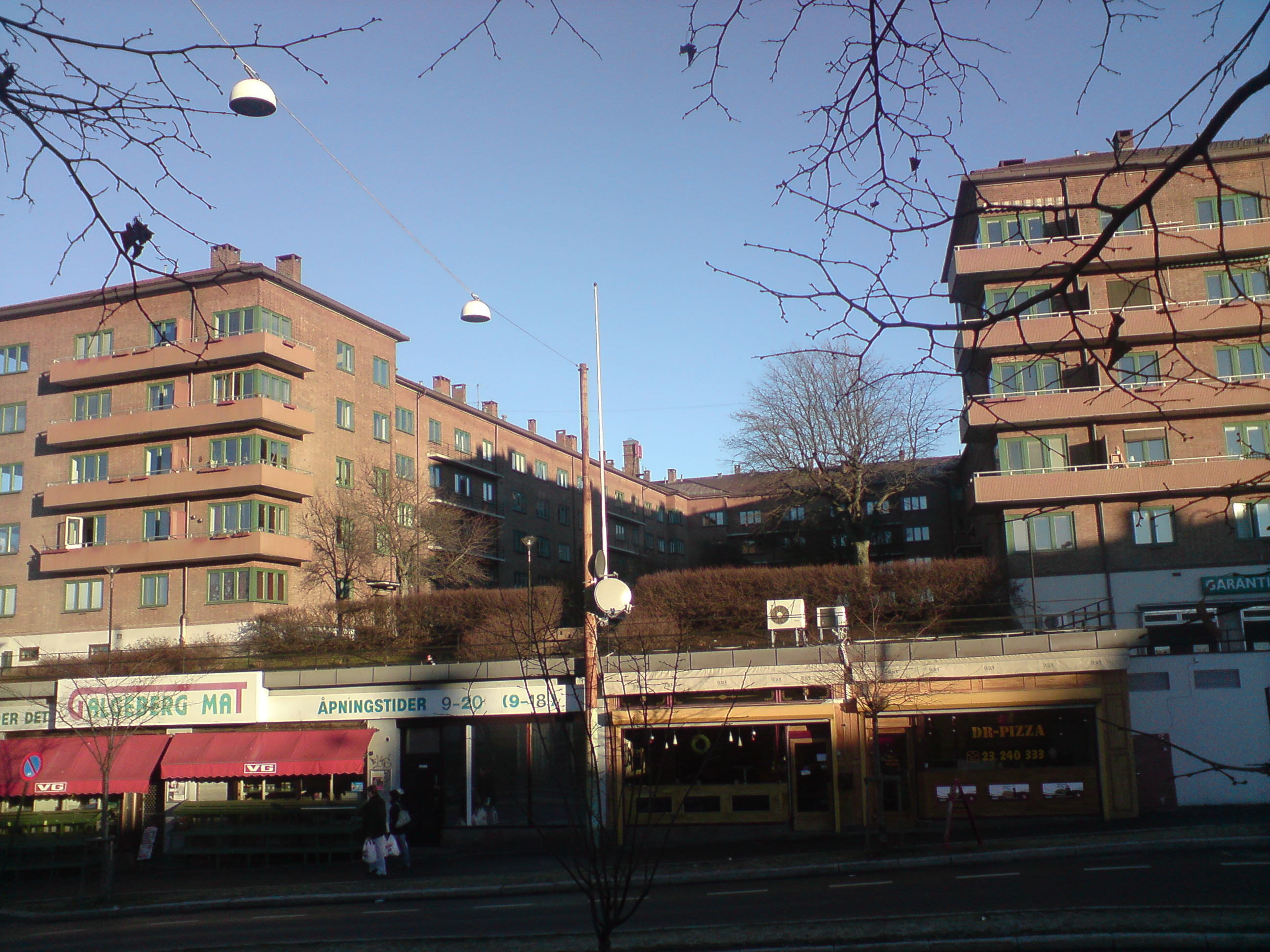 Galgeberg3 in Oslo